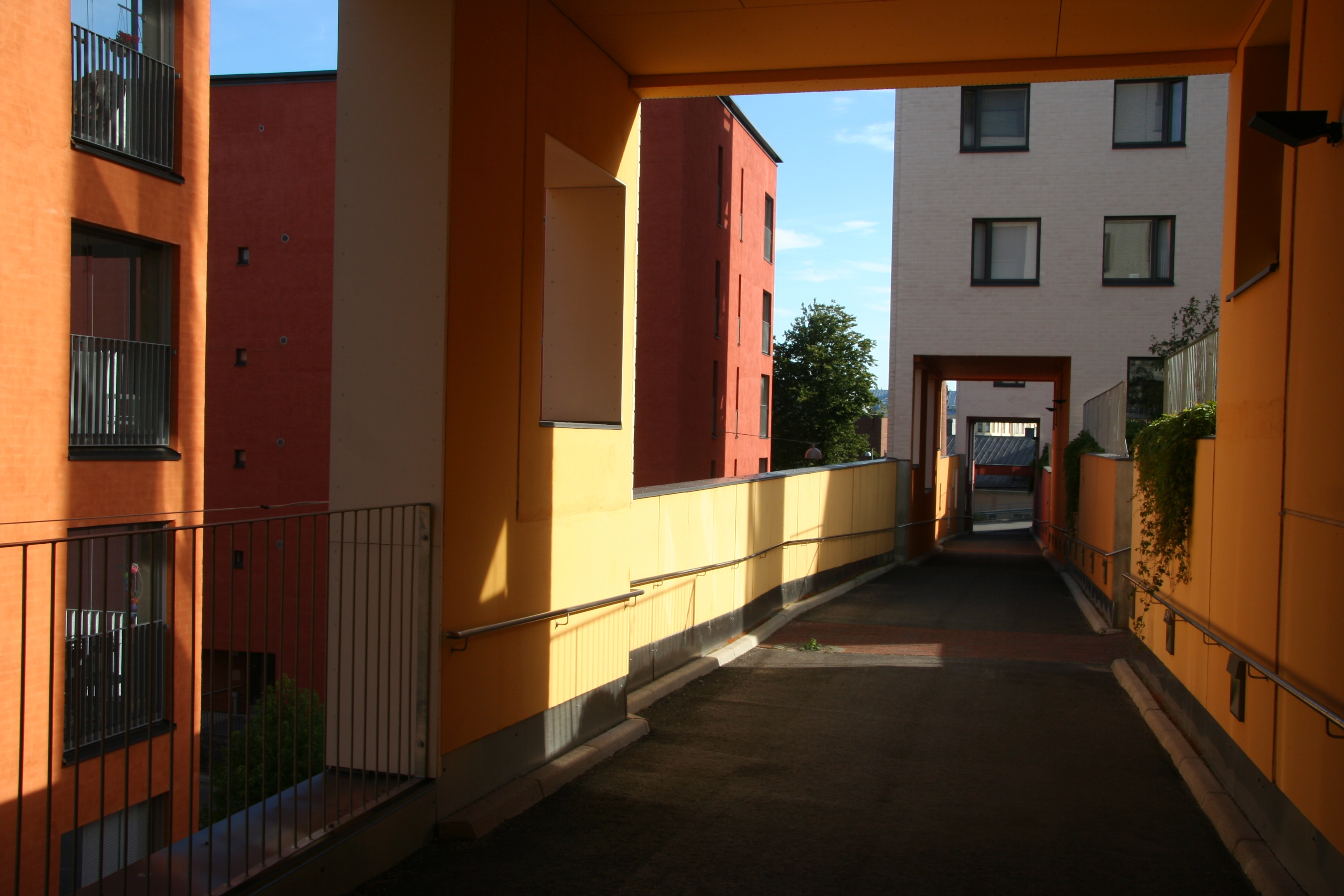 Hermanninvuori, Helsinki